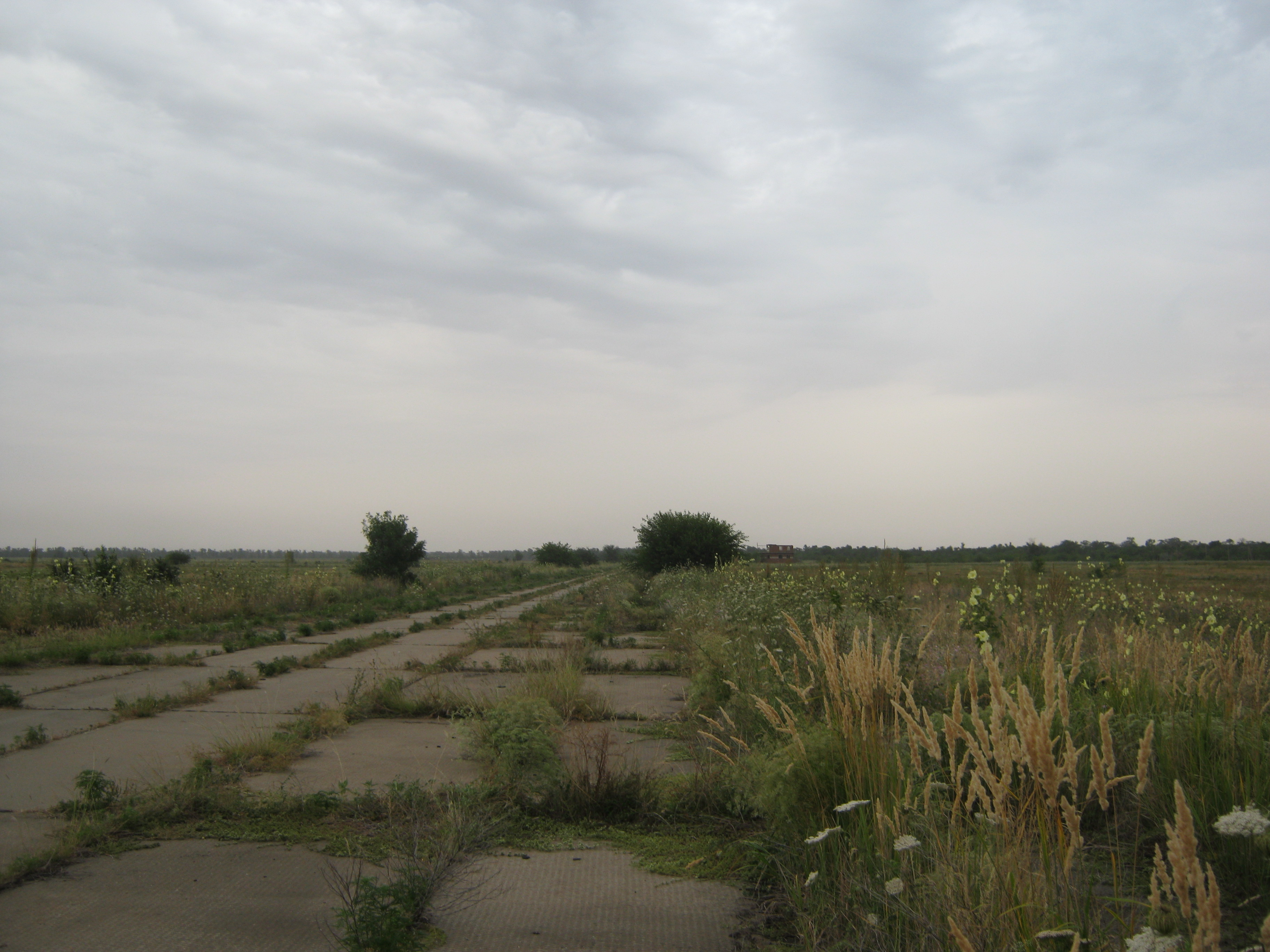 Аэродром Светлоград, вид с взлетной полосы